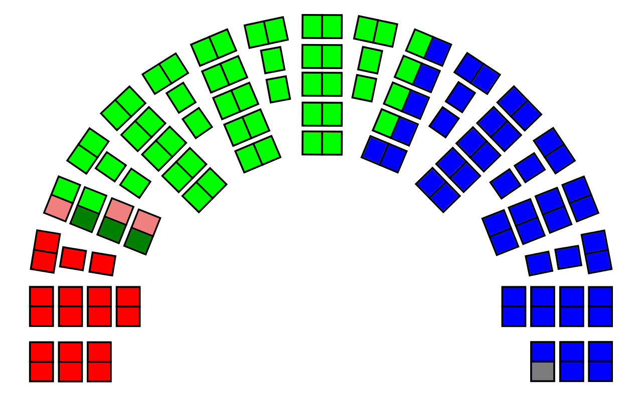 Mandatfordelingen etter Stortingsvalget 1918 illustrert med seter Arbeiderpartiet Norsk Landmandsforbund Radikale Folkeparti Venstre Høyre Uavhengig